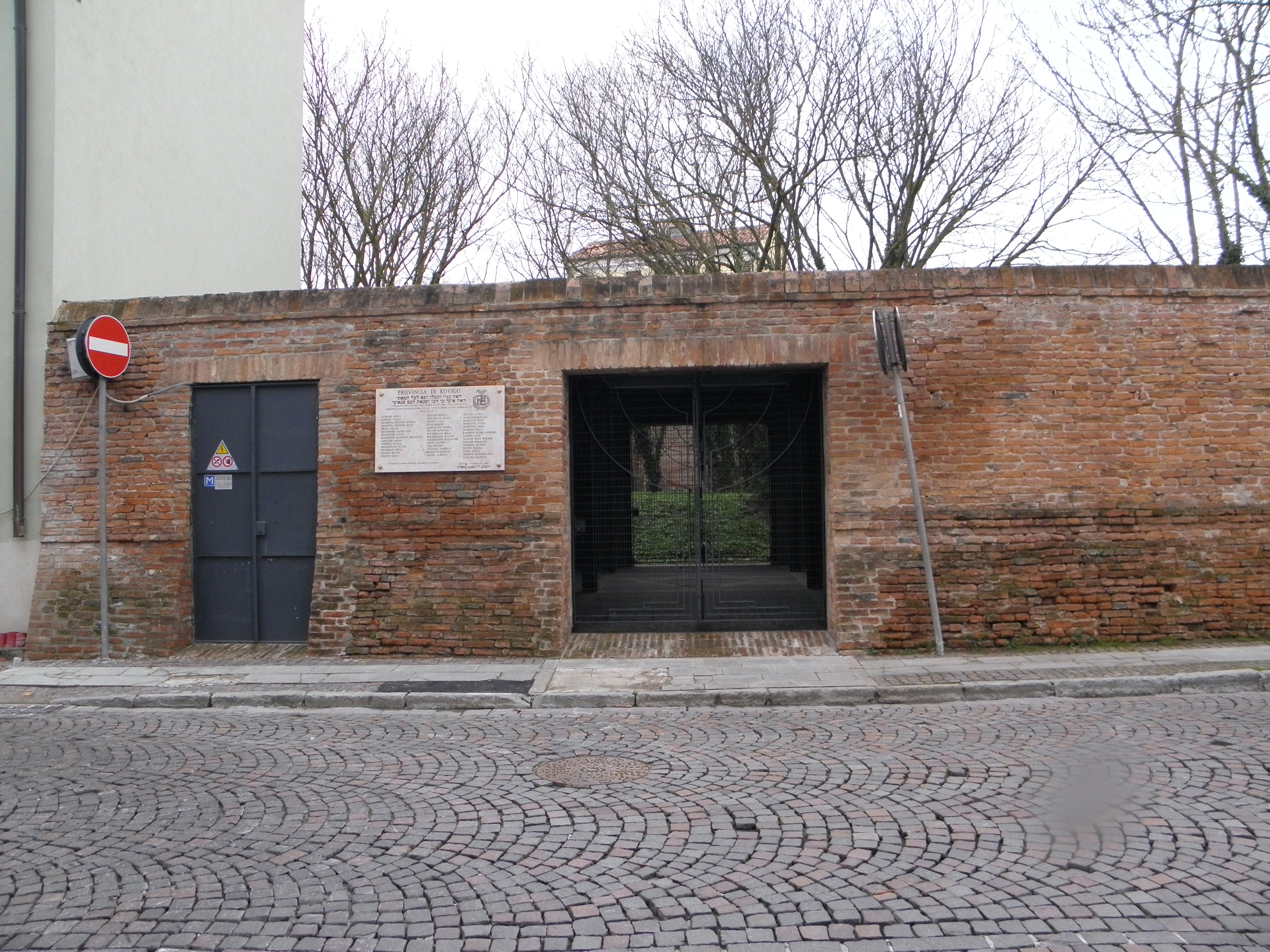 Rovigo: cancello d'entrata del vecchio cimitero ebraico sito in Piazzale Soccorso, dietro la Chiesa di Santa Maria del Soccorso, detta "la Rotonda".